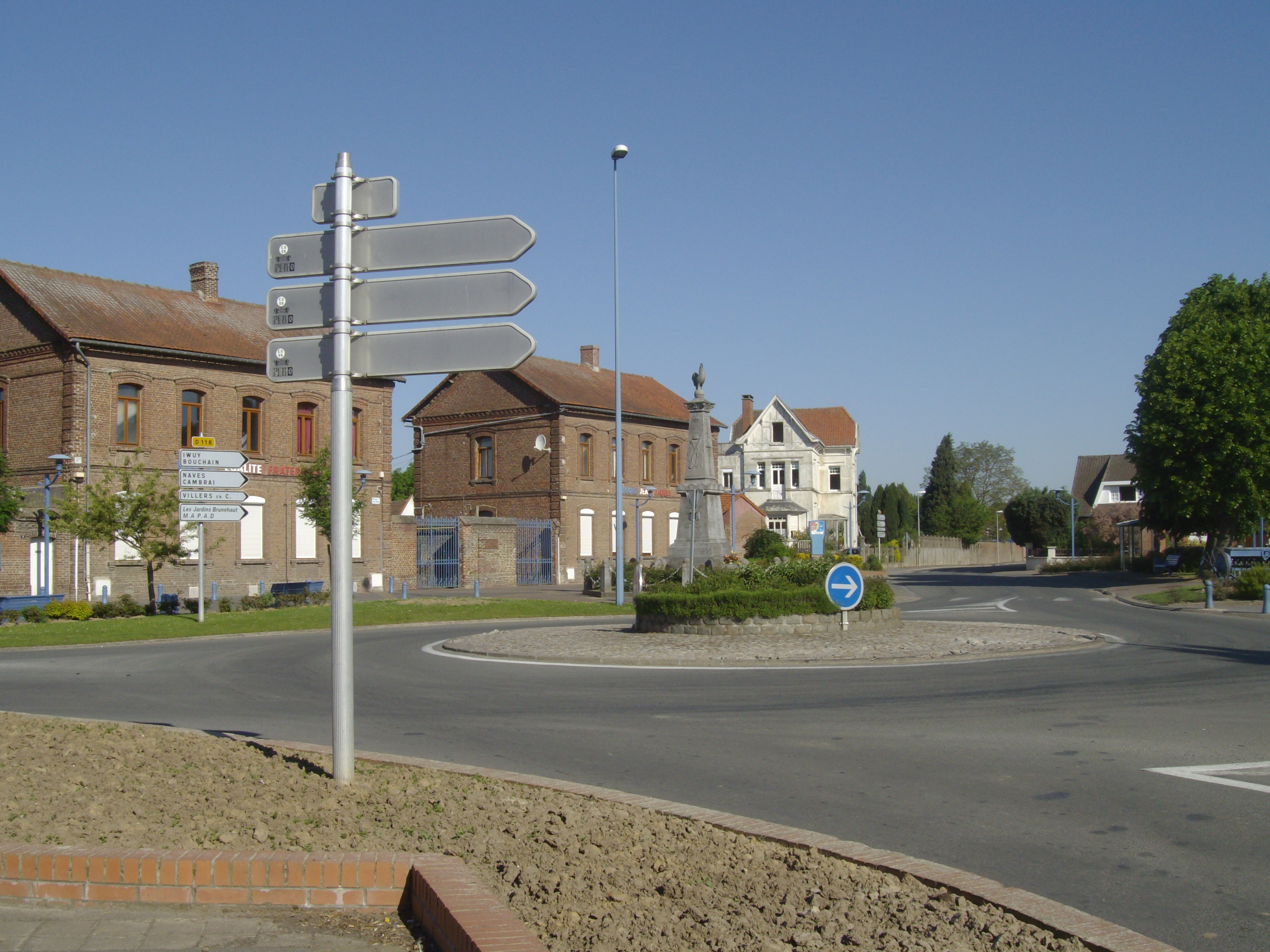 Place du village